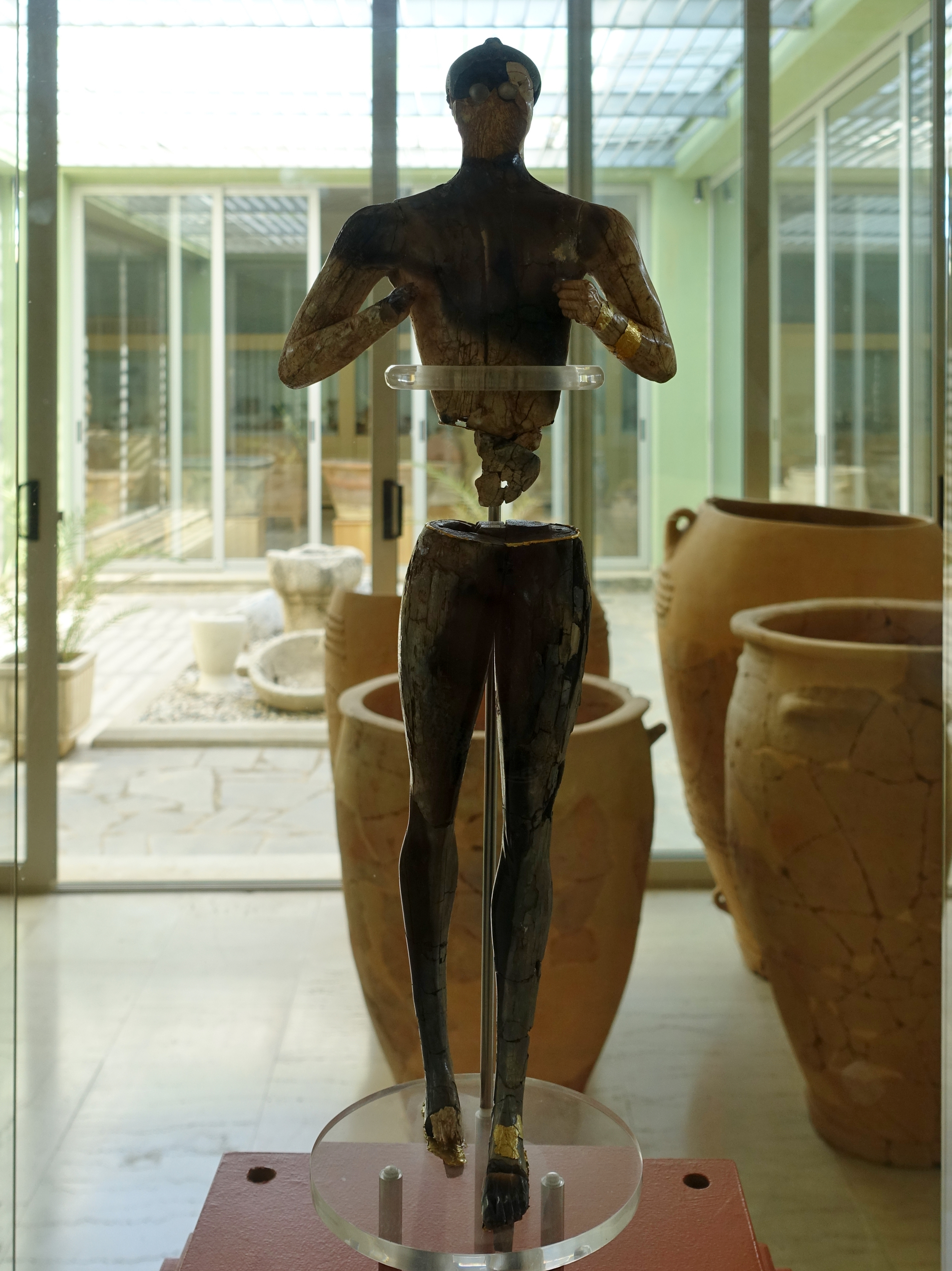 Kouros von Palaikastro (1480–1425 v. Chr.), minoische Götterstatue aus Haus 5 der Ausgrabungsstätte von Roussolakkos, Archäologisches Museum von Sitia, Kreta, Griechenland